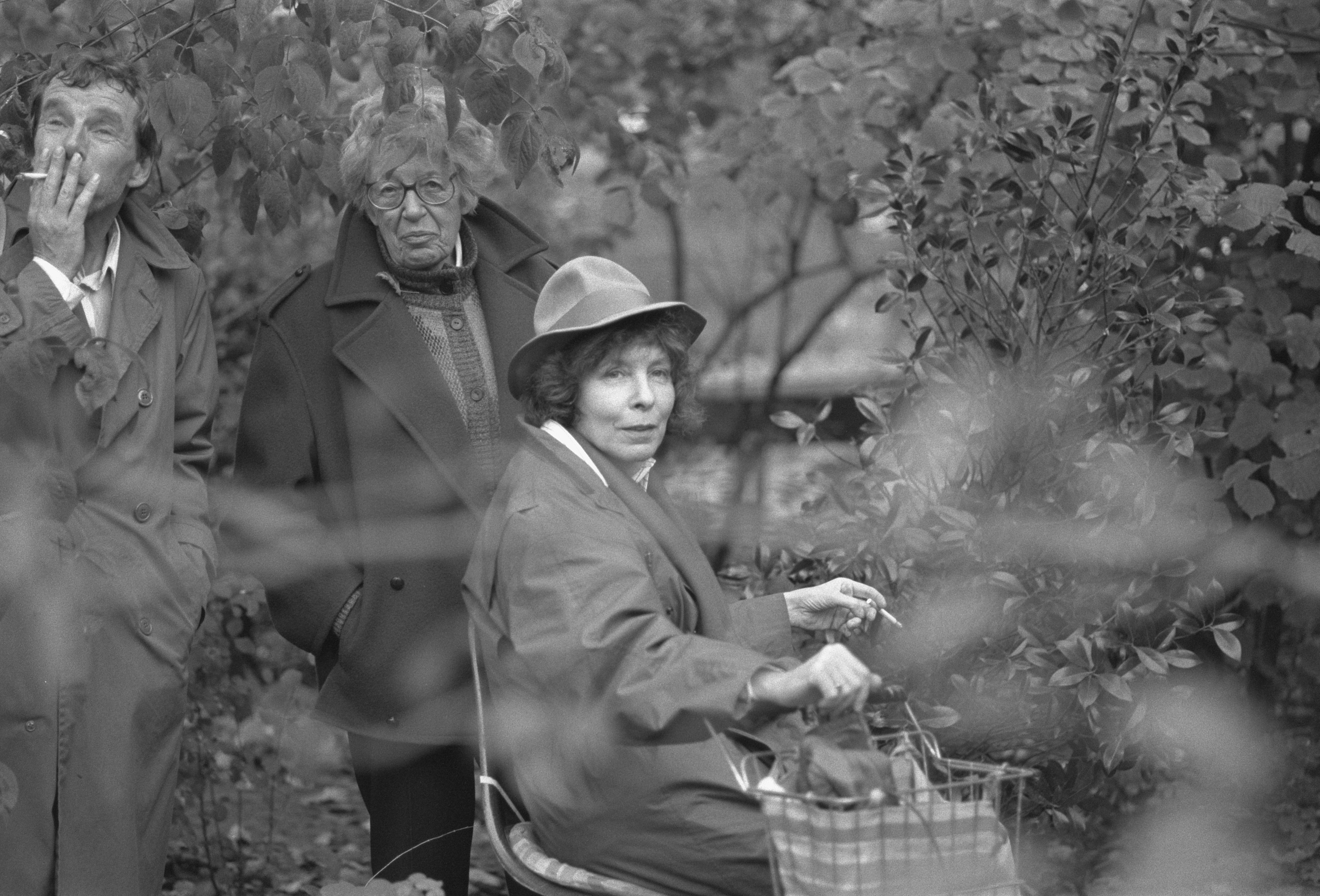 Borstbeeld Simon Carmiggelt (Kronkel) onthuld in Amsterdam; Peter Vos, Annie M. G. Schmidt en Renate Rubinstein (r) tussen struiken